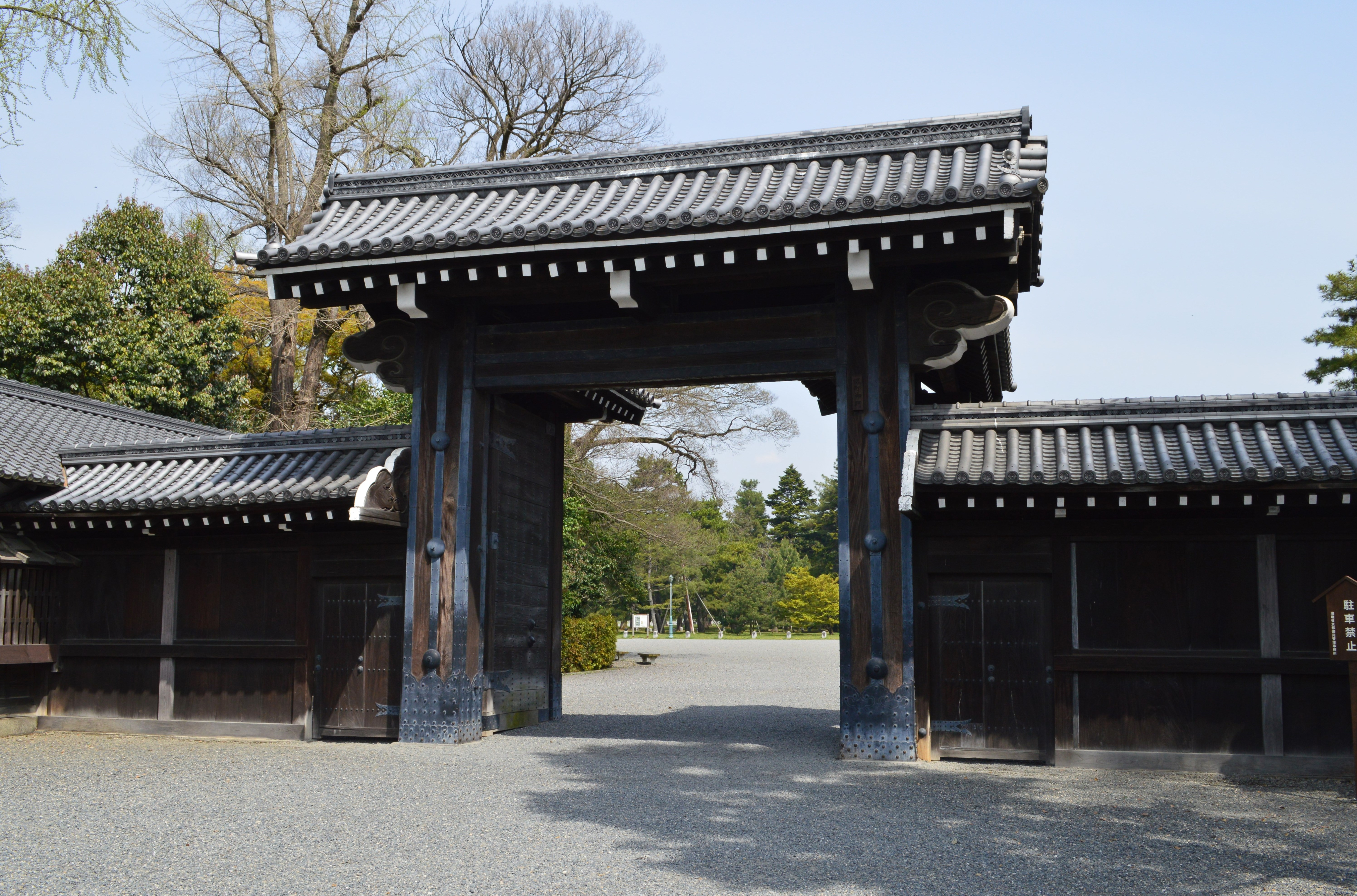 京都御苑 堺町御門